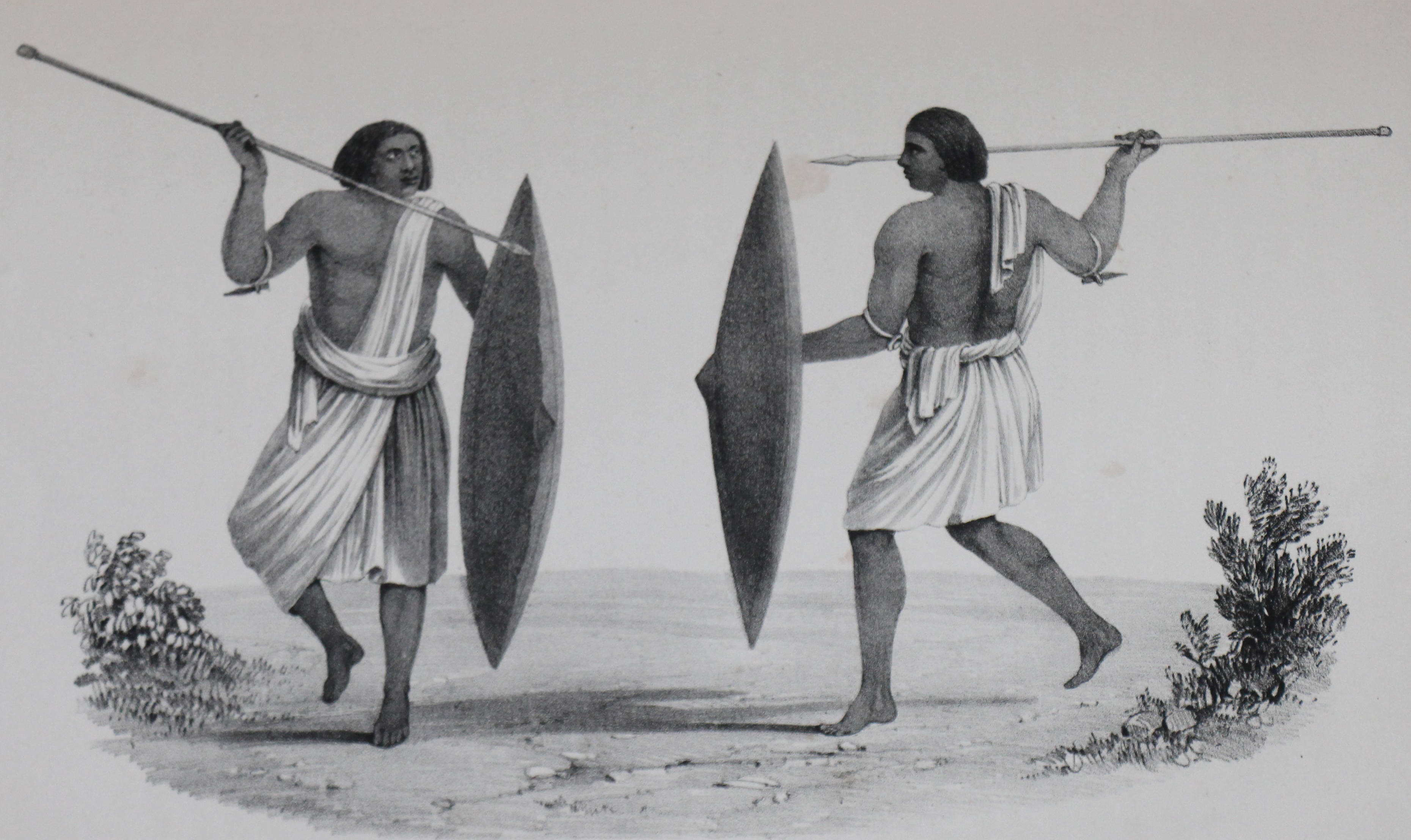 اثنان من قبيلة الشايقية بأسلحتهما